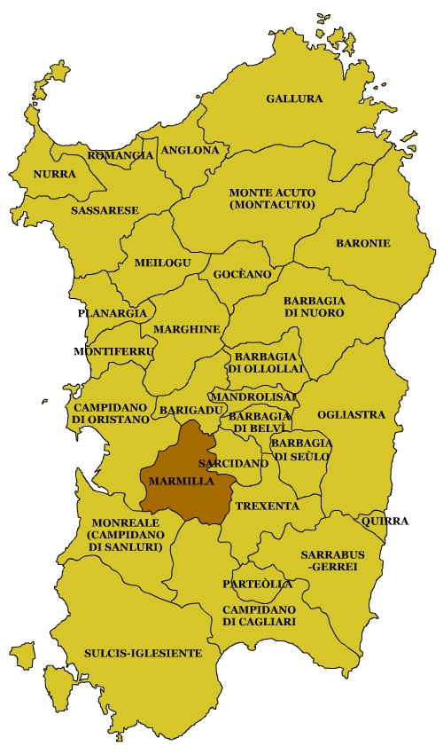 Sardinian Subregions